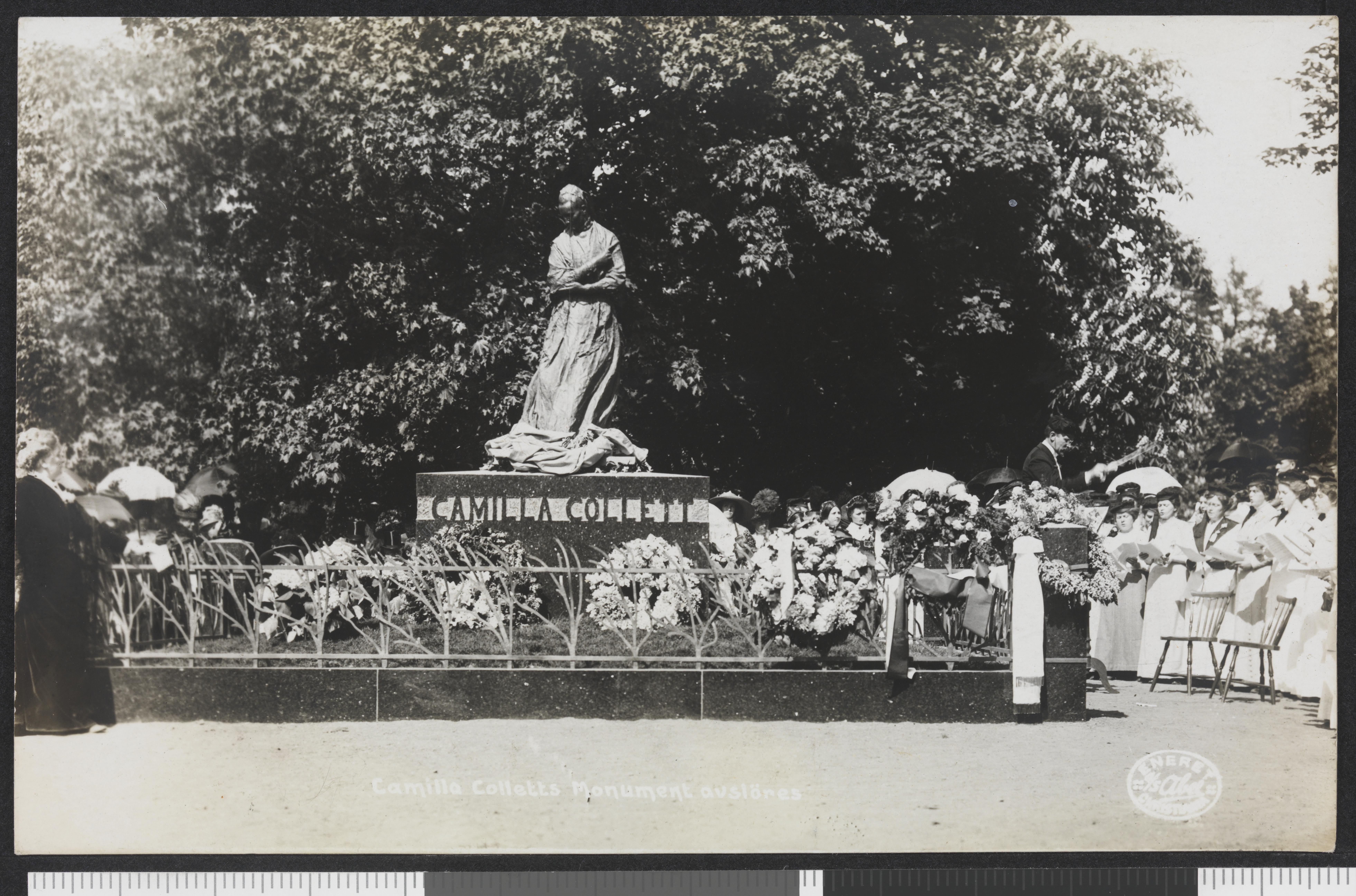 Bildet er hentet fra Nasjonalbibliotekets bildesamling Slottsparken, Oslo, Oslo